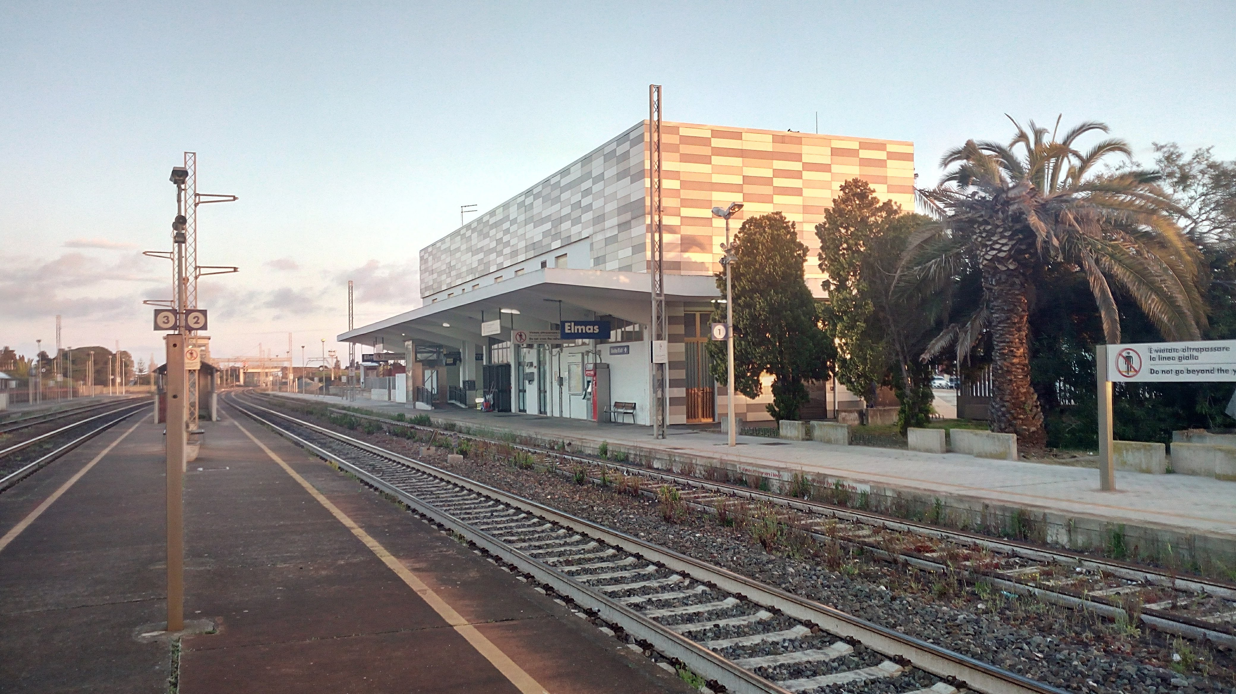 I binari 1 e 2 della stazione ferroviaria di Elmas.